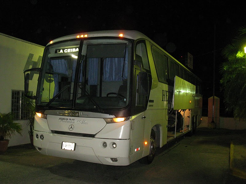 Comil Campione Vision 3.65 en la terminal de Ceiba.